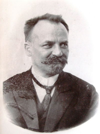 Vlastimil Svatopluk Juren (1864 – Praha) - český evangelický farář a spisovatel